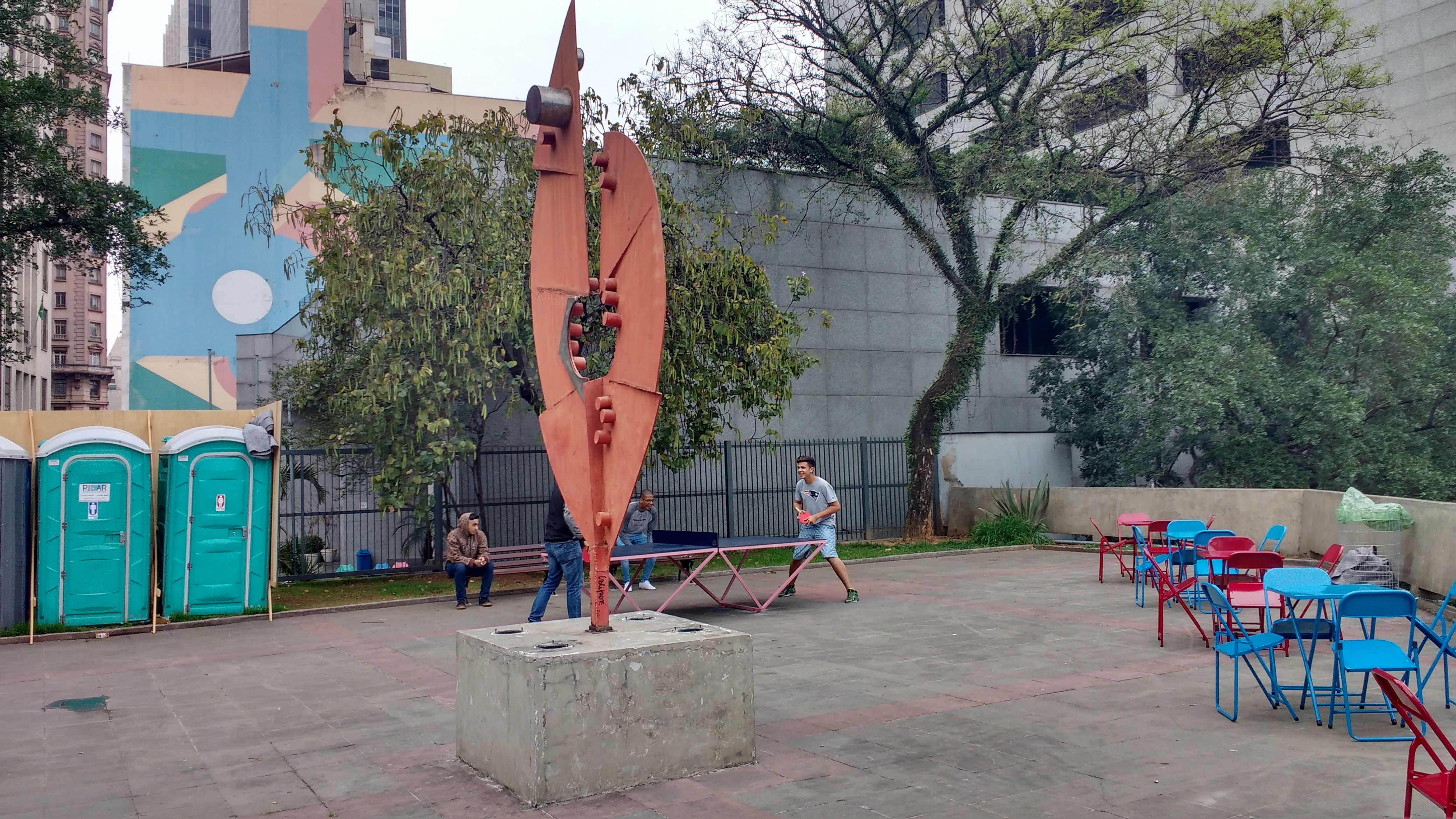 Banheiros, monumento e mesa de ping pong no Largo de São Bento, em São Paulo (SP)